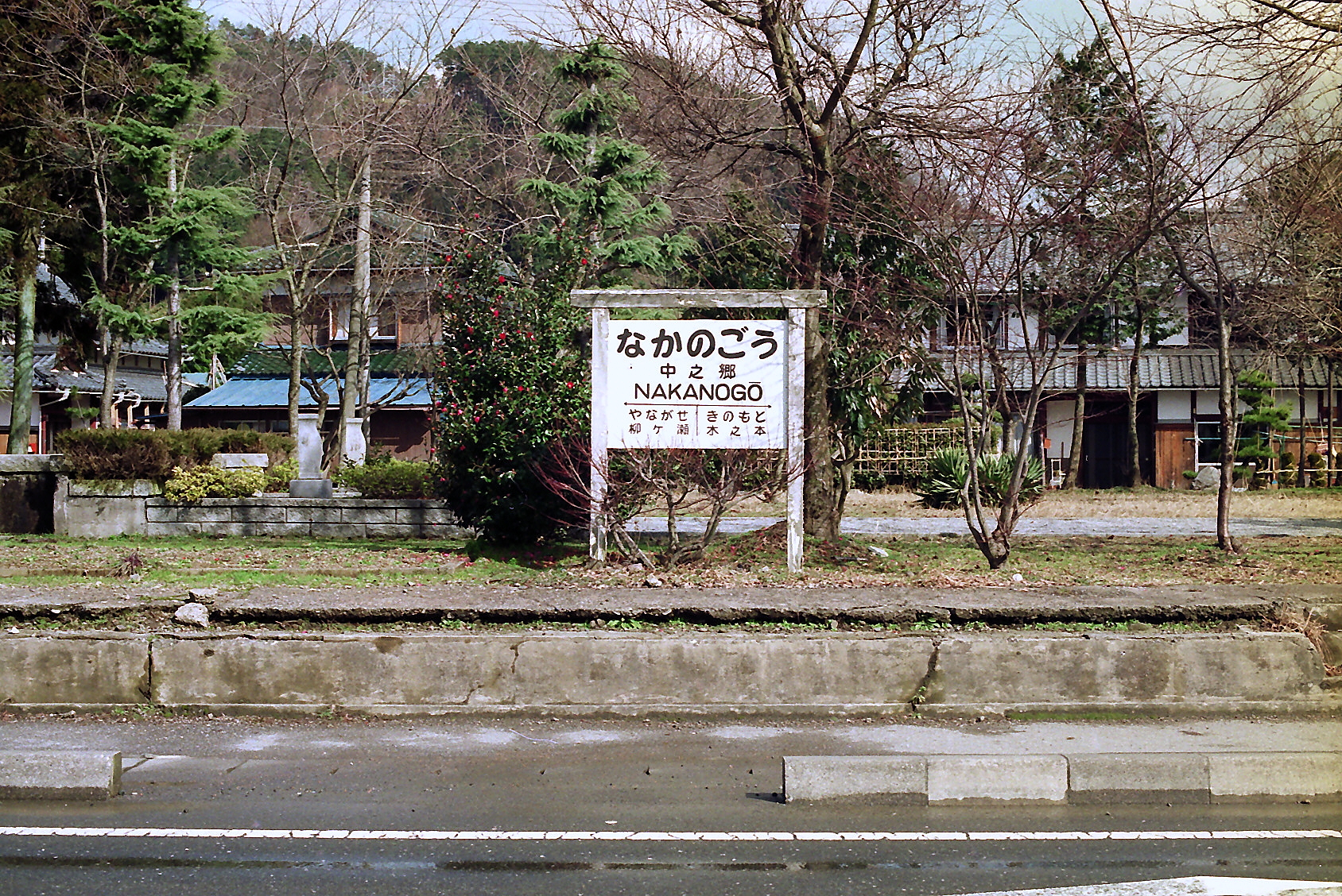 旧北陸本線 中之郷駅跡 滋賀県長浜市余呉町中之郷